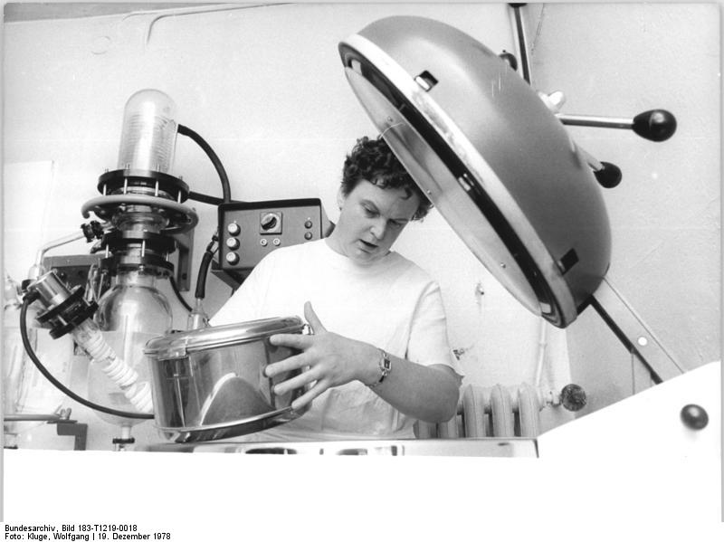 Mügeln, Schwester beim Sterilisieren im Autoklav ADN-ZB Kluge 19.12.78 Bez. Leipzig: Landambulatorium. Schwester Anita Herzog arbeitet in der Sterilisationsanlage des Mügelner Landambulatoriums, wo u.a. Verbandsmaterial, OP-Wäsche und Instrumente keimfrei gemacht werden. Das modern eingerichtete Ambulatorium ermöglicht eine gute medizinische Betreuung der rund 12000 Einwohner des Gemeindeverbandes Mügeln.